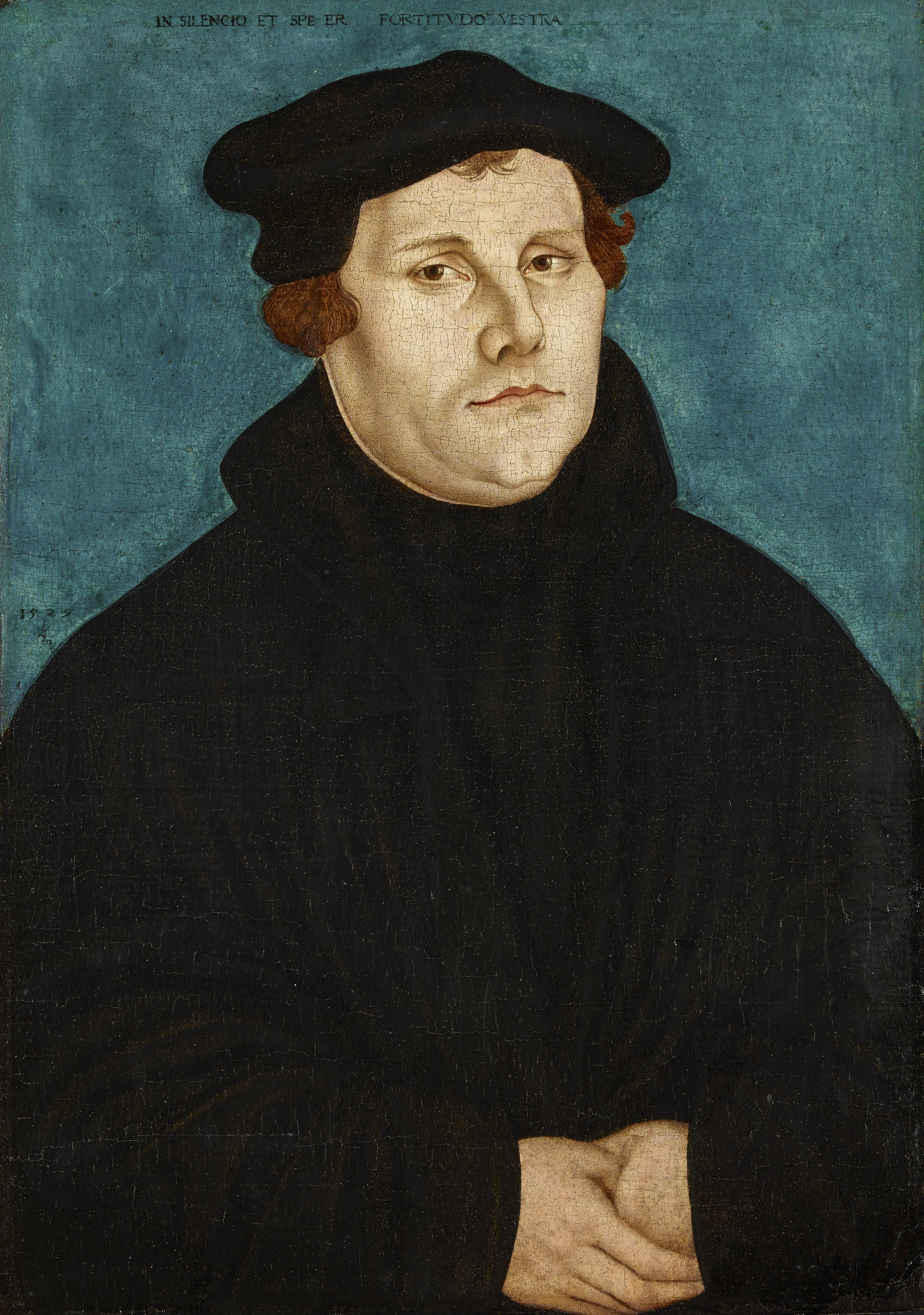 Martin Luther in der Amtstracht des evangelischen Geistlichen